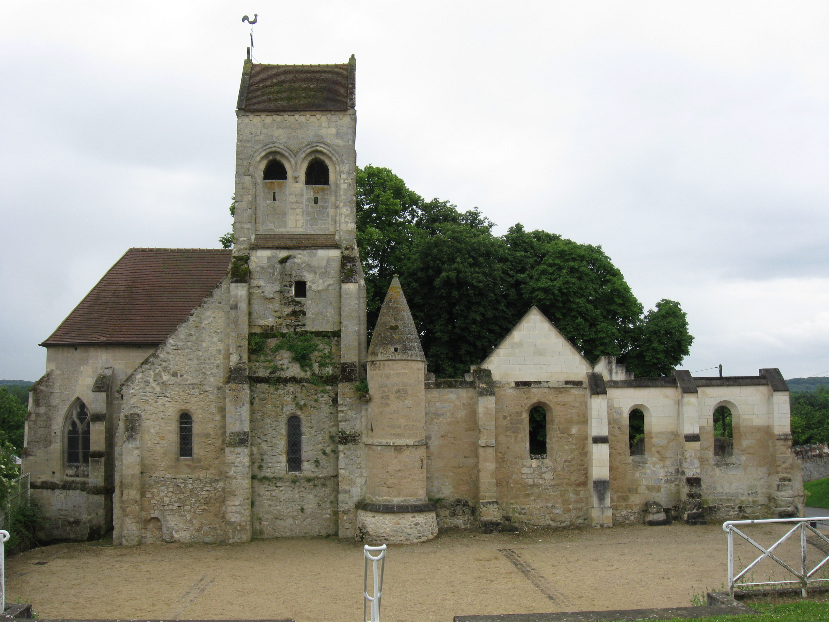 Église Saint-Brice de Neufchelles. (Oise, Picardie).